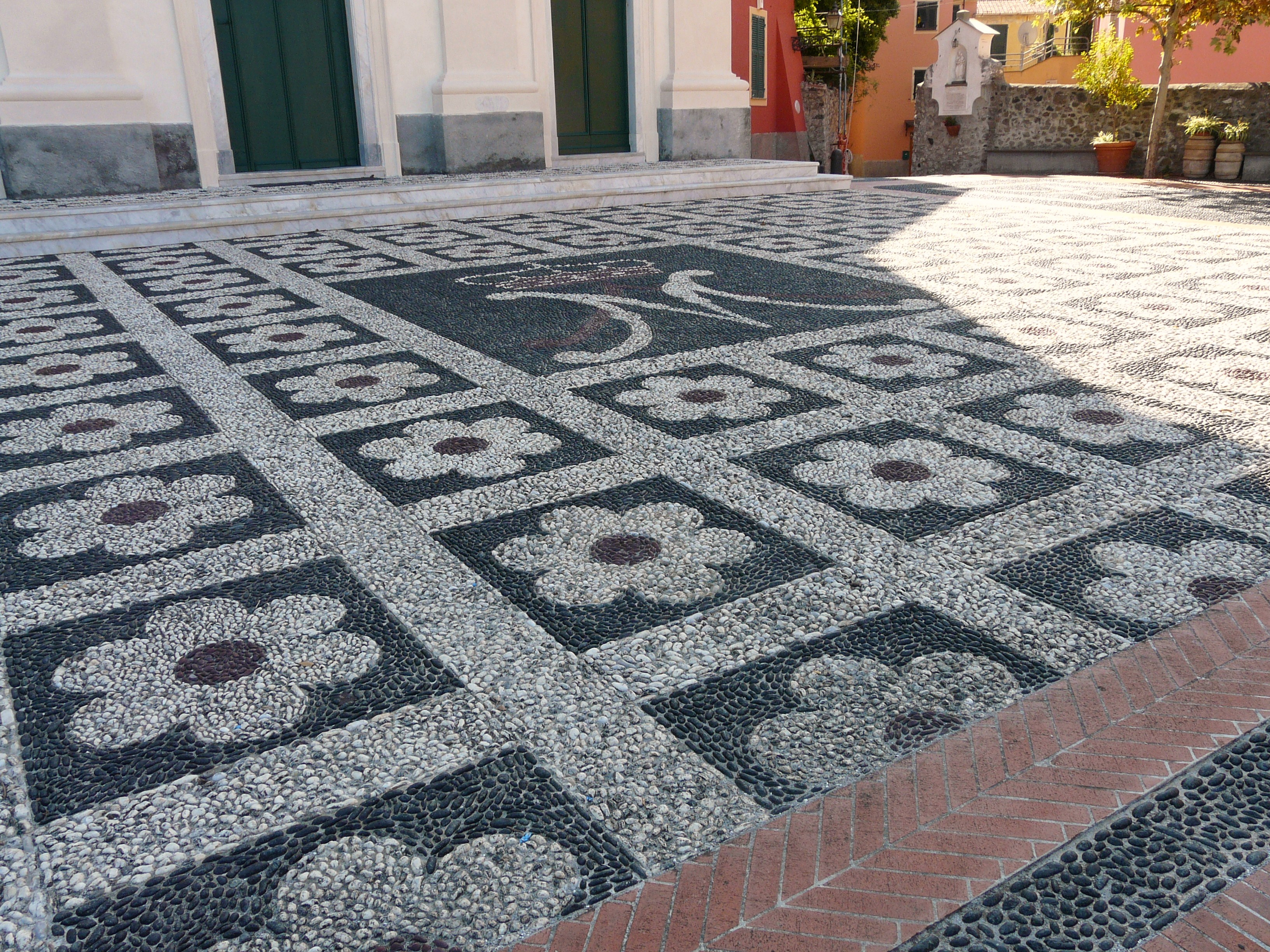 Sagrato della chiesa di Santa Sabina nella frazione di Trigoso, Sestri Levante, Liguria, Italia